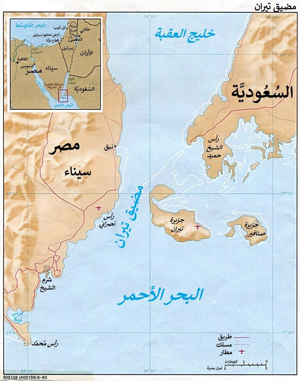 مضيق تيران بين خليج العقبة والبحر الأحمر.